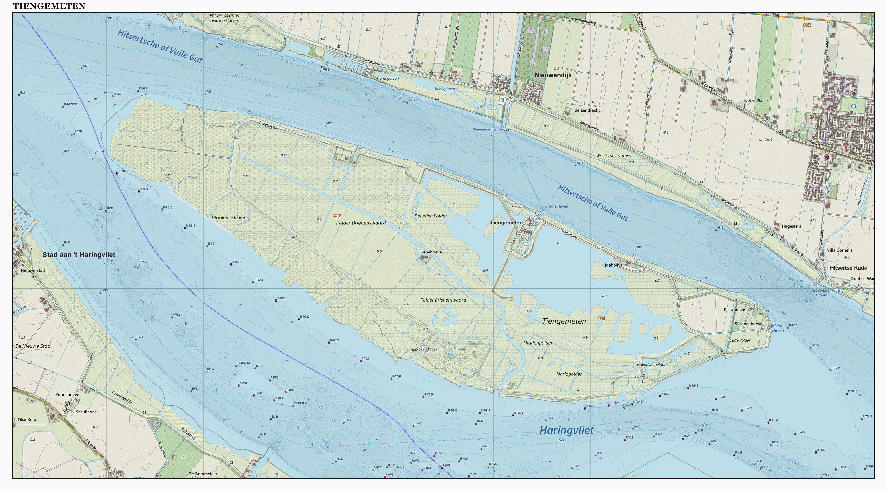 Topografische kaart van Tiengemeten (natuurgebied). Resolutie: 400 pixels/km. Samengesteld door Jan-Willem van Aalst op basis van de GML open geodata van de BRT/Top10NL (basisregistratie Topografie, Kadaster), vrijgegeven door Kadaster onder de Creative Commons BY licentie. Additionele gegevens uit BAG uit de Open Street Map en uit de Risicokaart. Zie ook de Legenda.